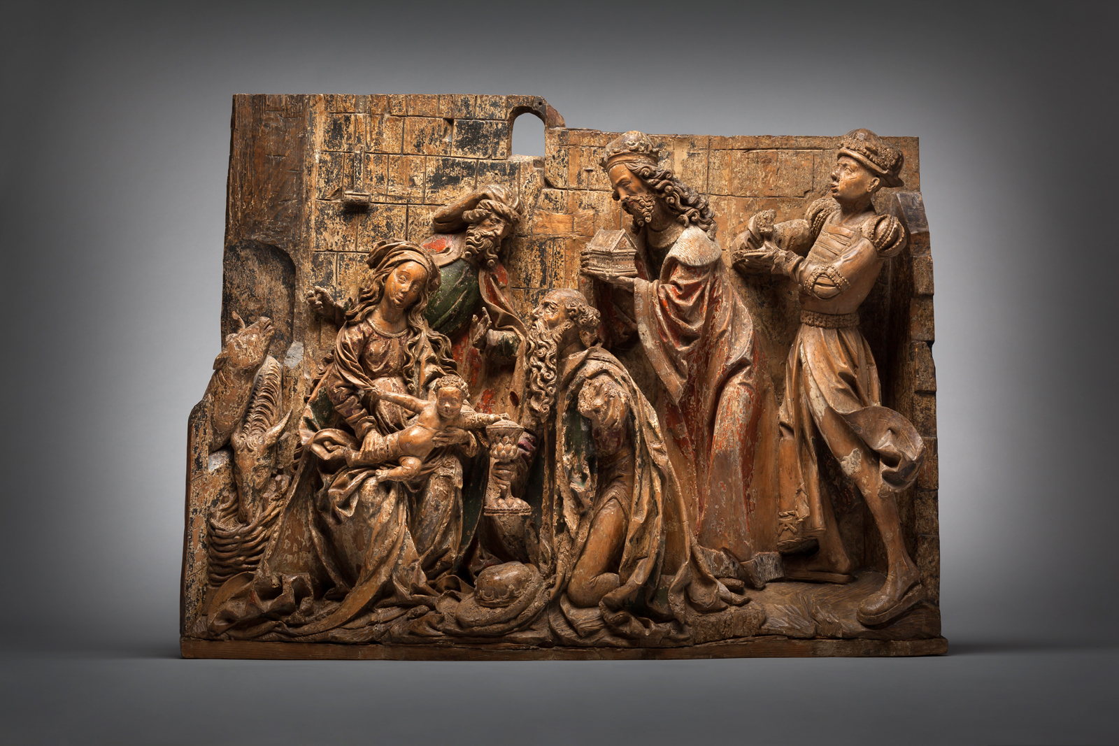 Klanění tří králů z Českých Budějovic, Alšova jihočeská galerie v Hluboké nad Vltavou